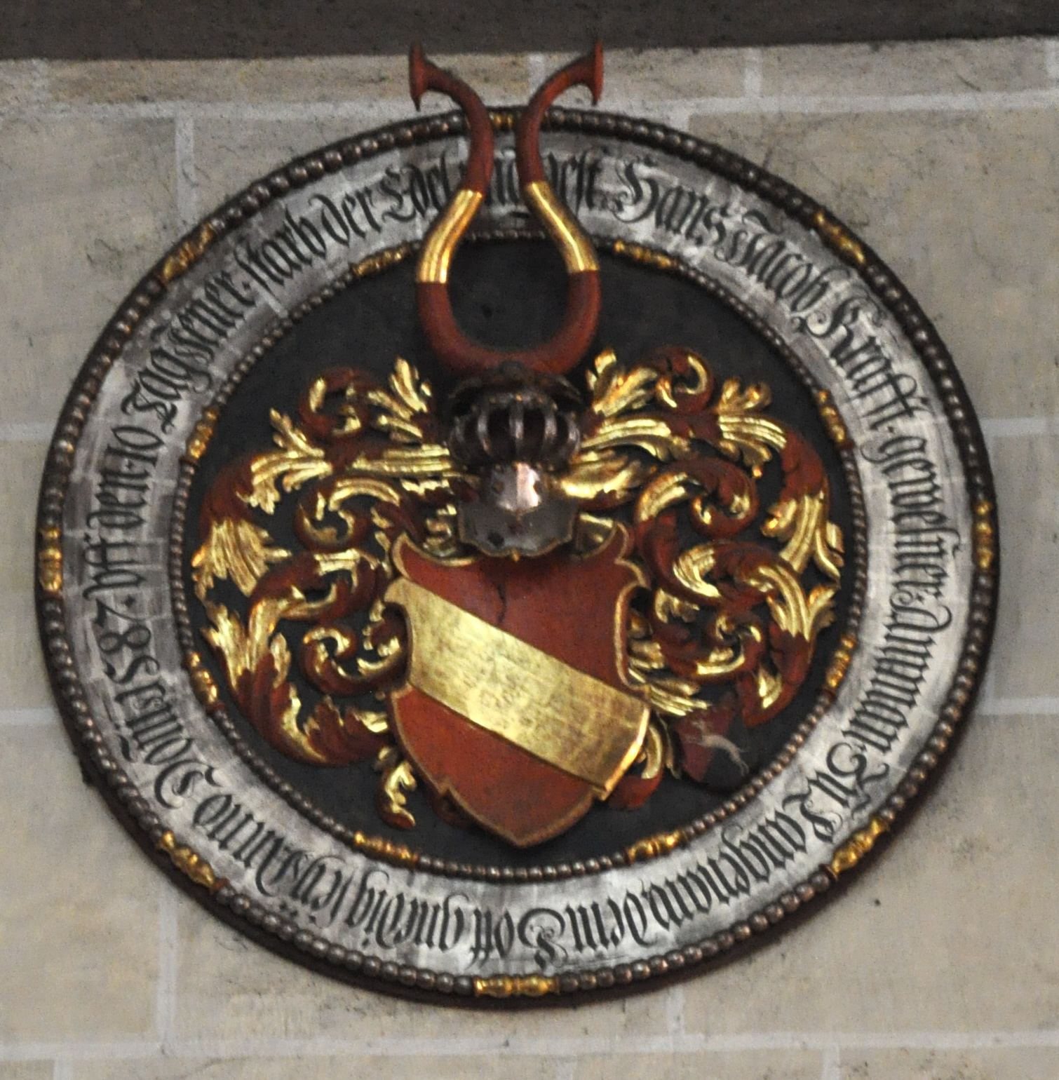 Ulmer Münster, Totenschild Hans Jacob Krafft († 10. Januar 1587) Inschrift: "Anno Do[mi]ni 1587 vff den 10 Tag Jener starb der Edel vnd Vest Hans Jacob Krafft gewesner Amman Zu Langenaw, dem Gott gnedig sey." Beiwappen: Baldinger